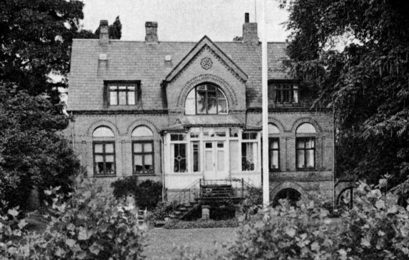 Sortedam Dossering 37 in Copenhagen, HQ of C.P. Jürgensens mekaniske Etablissement. Later demolished.